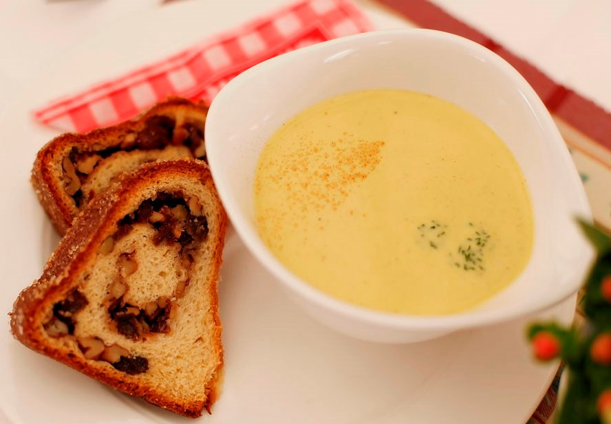 Die Villacher Kirchtagssuppe ist ein Kärntner Heiligtum. In die Villacher Kirchtagssuppe gehören Gemüse, Gewürze, Kräuter, süßer und sauer Rahm, Zimt, Safran, wovon die Suppe die gelbliche Farbe erhält und die drei Fleischsorten Rind, Huhn und Schwein. Alle drei Fleischsorten werden dann klein geschnitten in der Suppe serviert. Dazu gibt's original Kärntner Reindling.